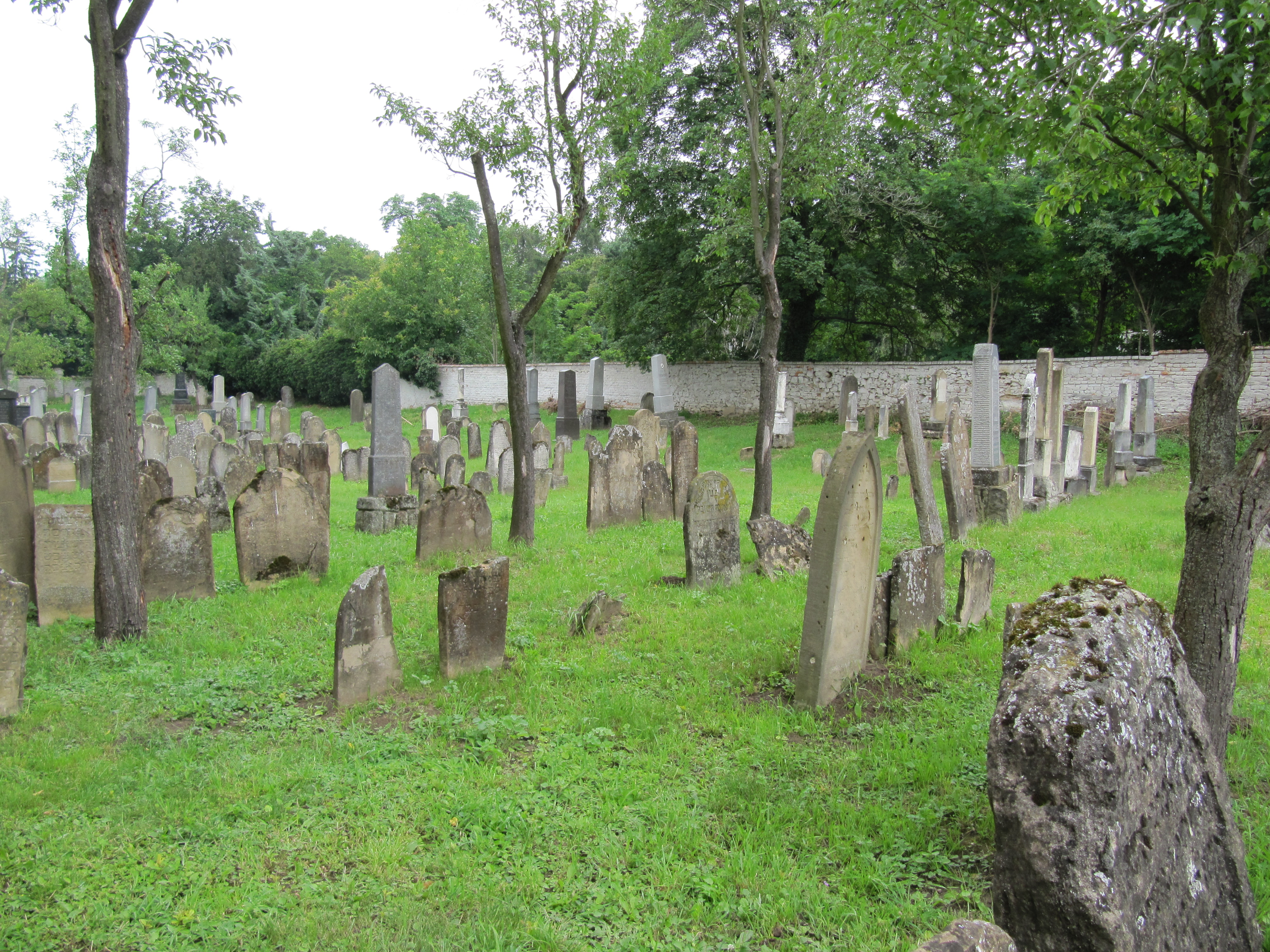 Strážnice, židovský hřbitov